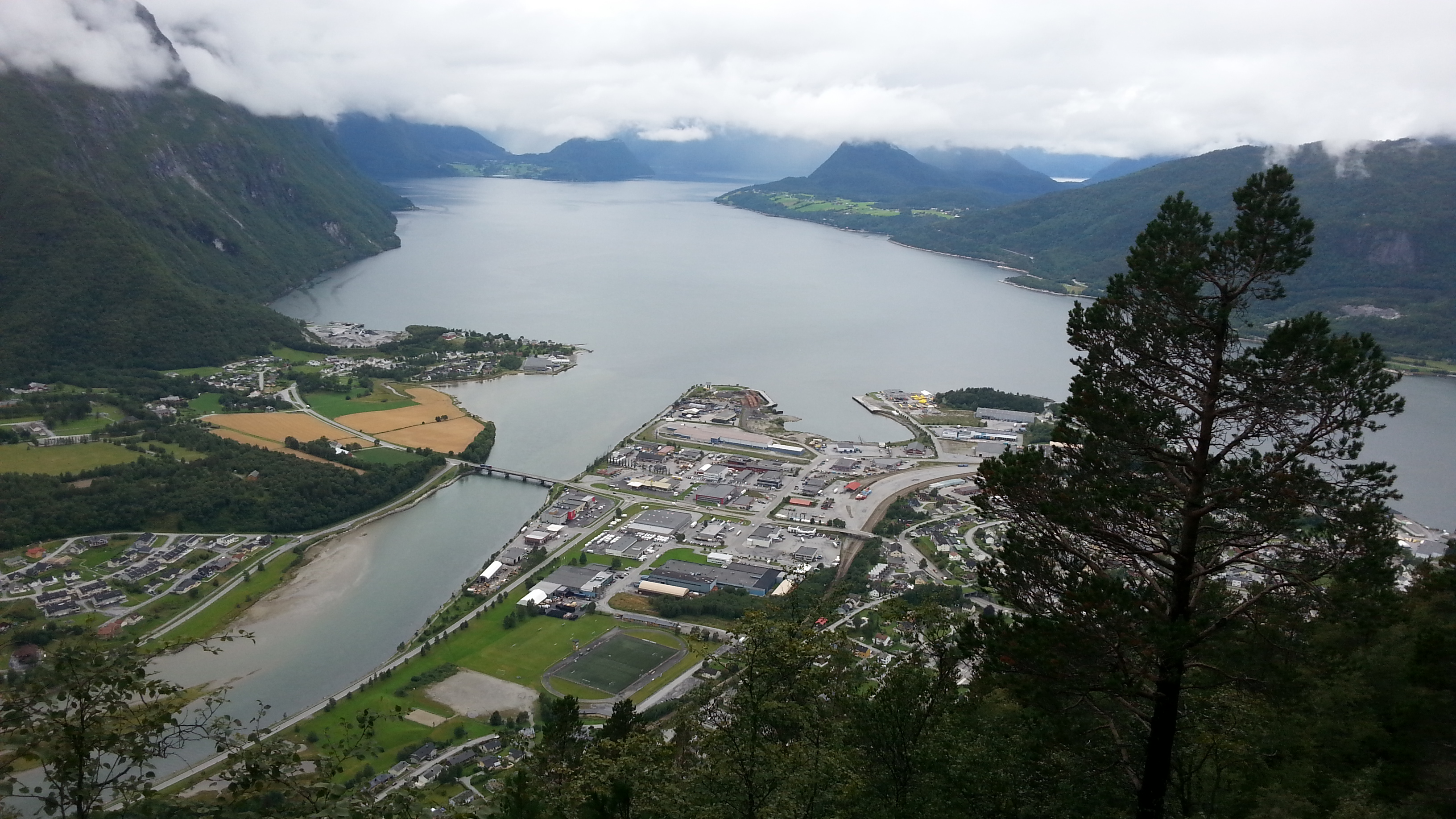 העיירה אנדלסנס בנורווגיה